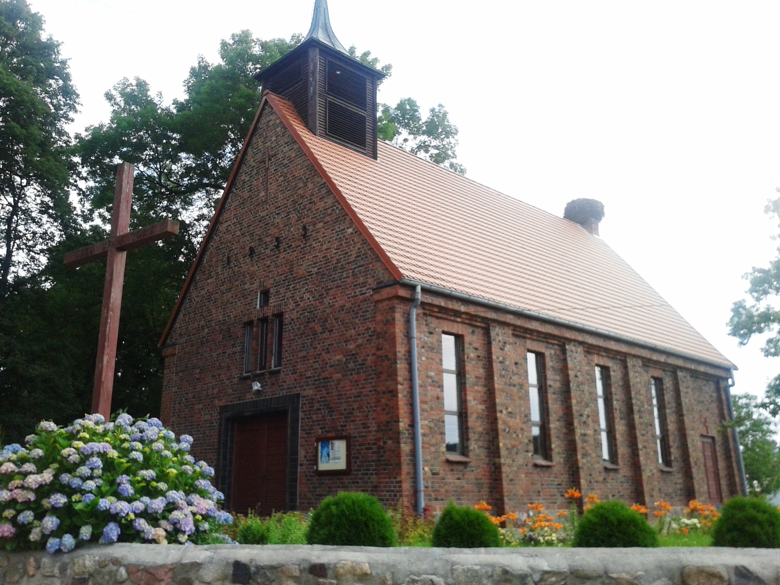 Wilczkowo - rzymskokatolicki kościół filialny p.w. św. Antoniego, 1933.